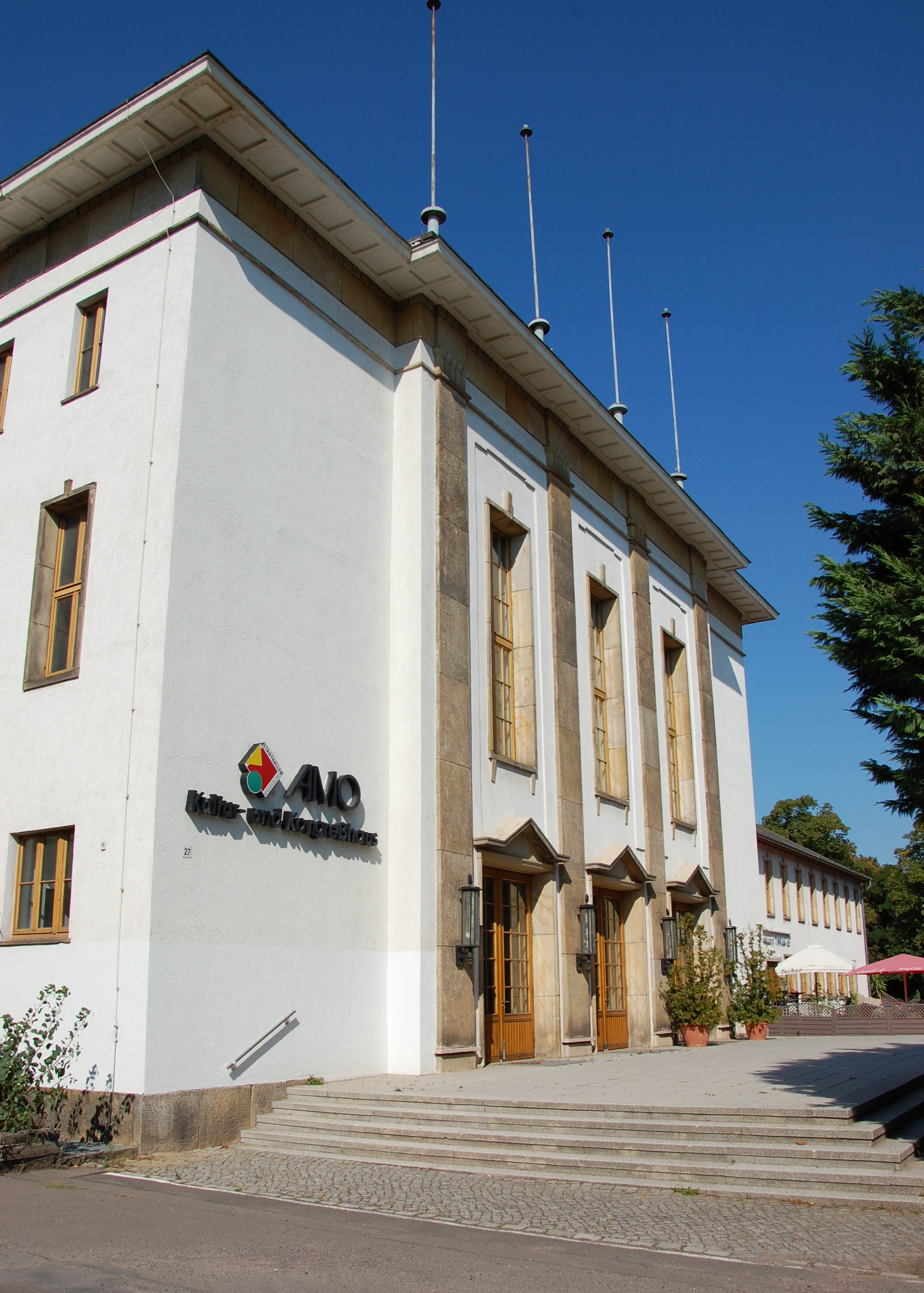 AMO Frontansicht